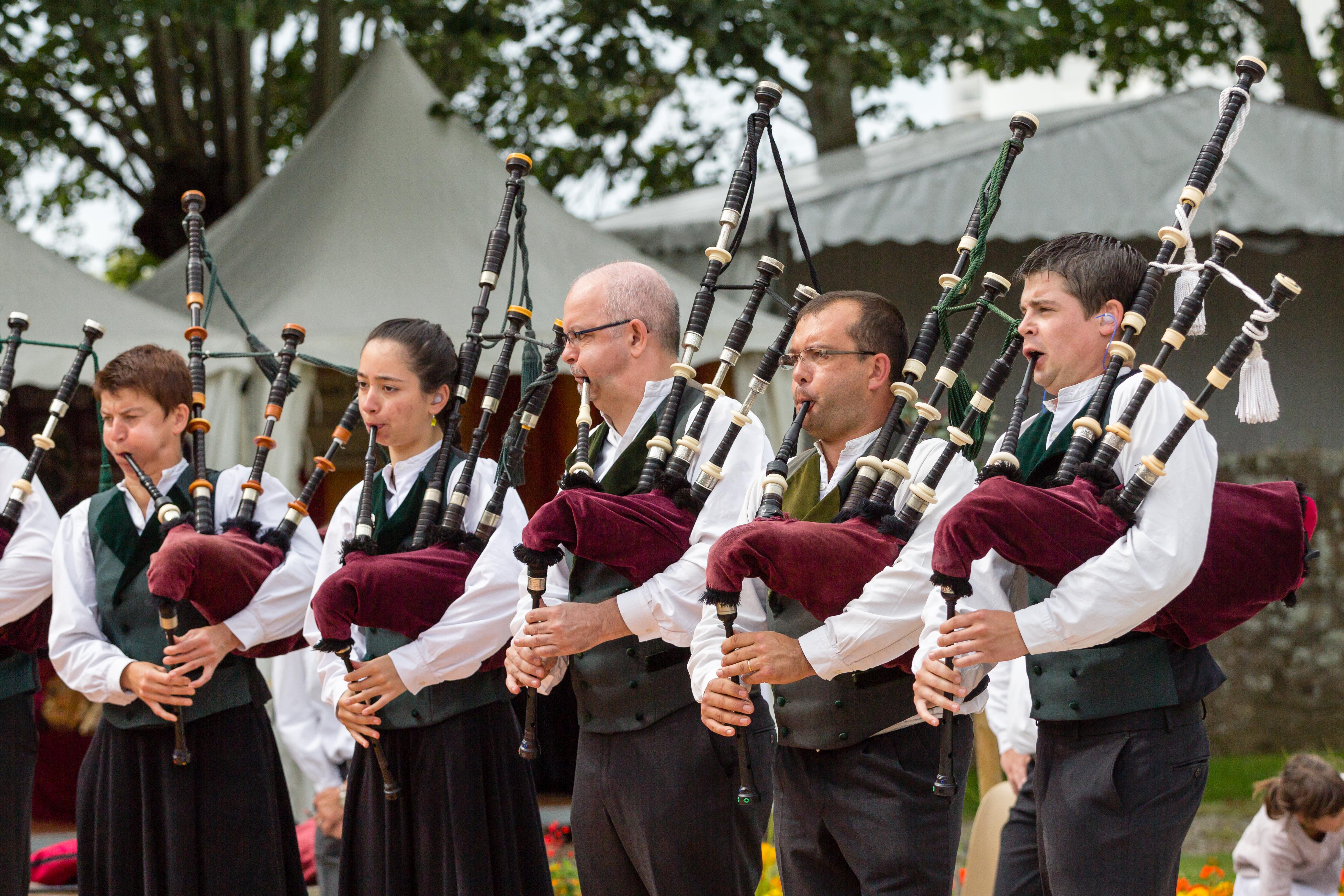 Le bagad Pañvrid ar Beskont lors du championnat national des bagadoù (deuxième catégorie) au FIL 2012.